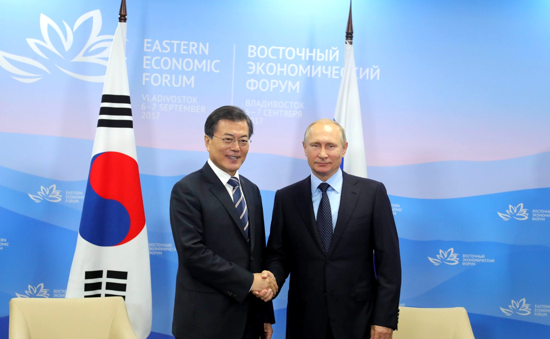 Президент России Владимир Путин с Президентом Республики Кореи Мун Чжэ Ином